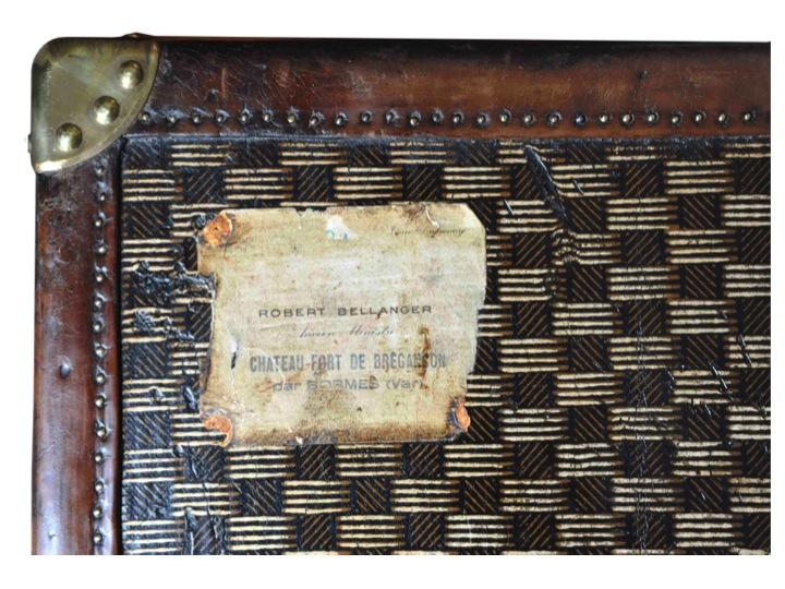 Malle "Moreau" appartenait à Robert Bellanger